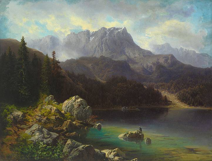 Zug-Spitz am Eib-See im Bayer. Hochgebirge, Öl auf Leinwand, 87 x 115 cm